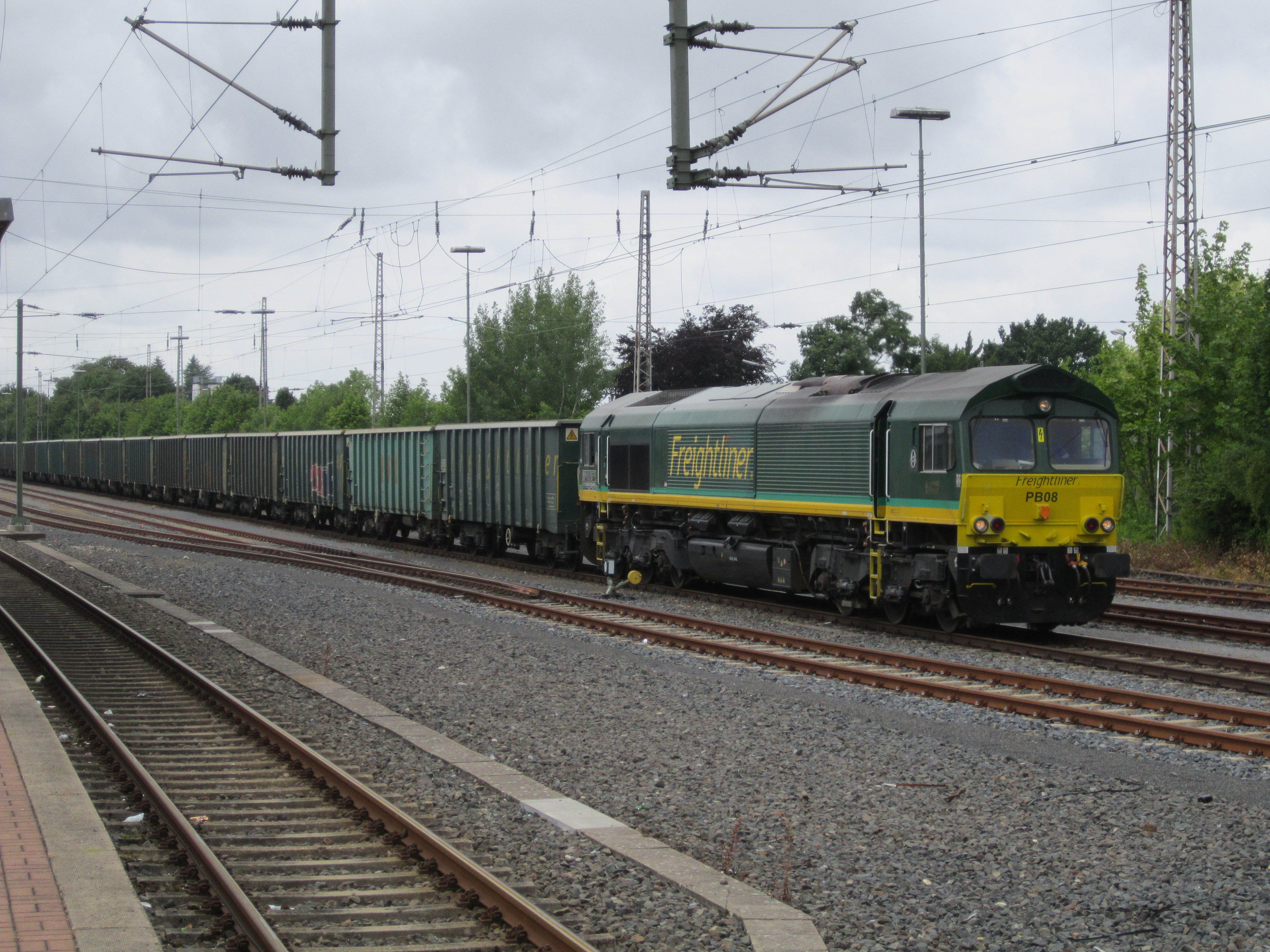 freightliner Lok PB 08